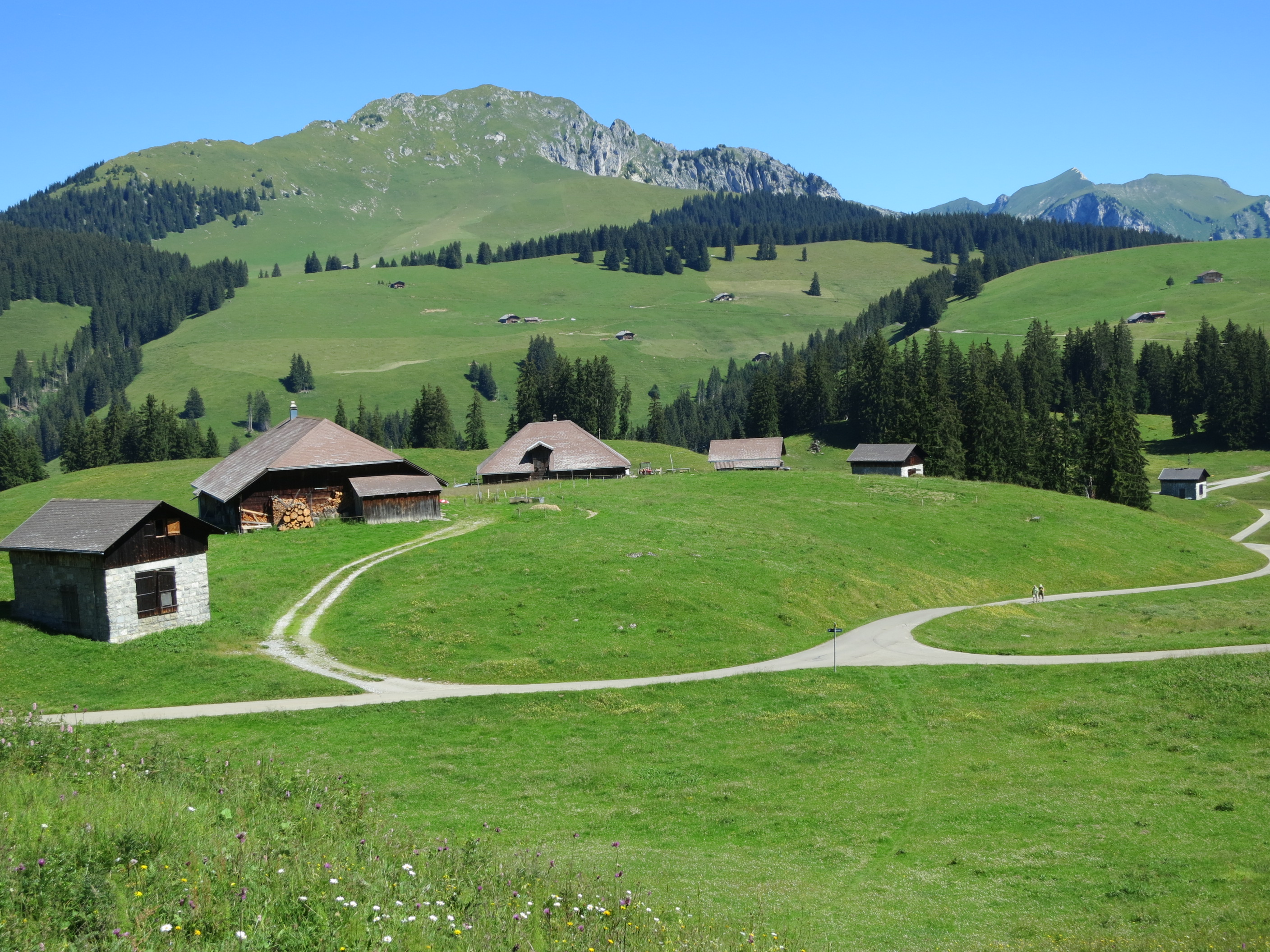 Jaunpass BE, Schweiz